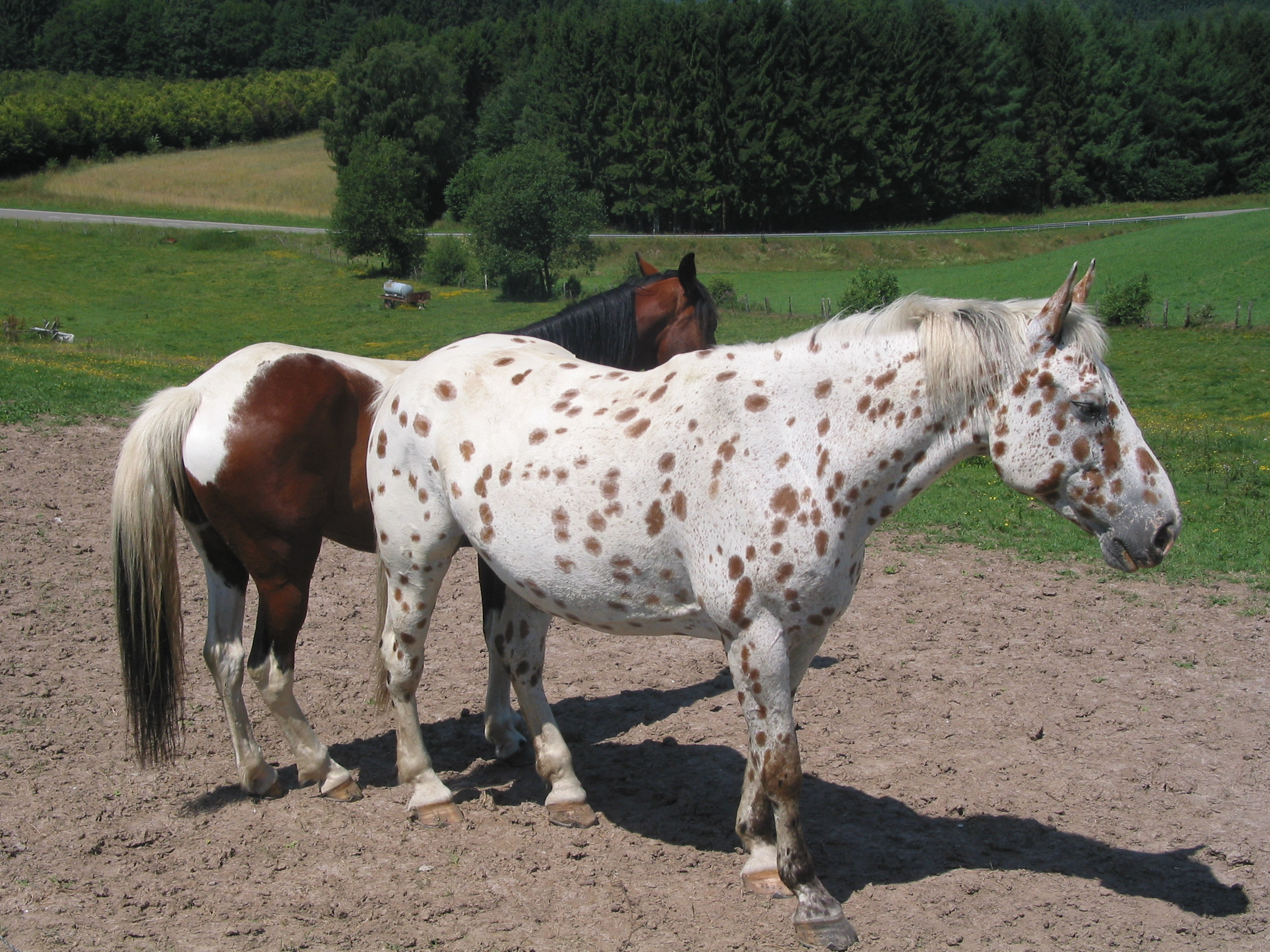 Appaloosa und Pinto horse (de), Appaloosa and Pinto horse (en), Appaloosa et Pinto horse (fr), Appaloosa en Pintohorse (nl), Apalousa èt T’chfau d’indyin (wa)